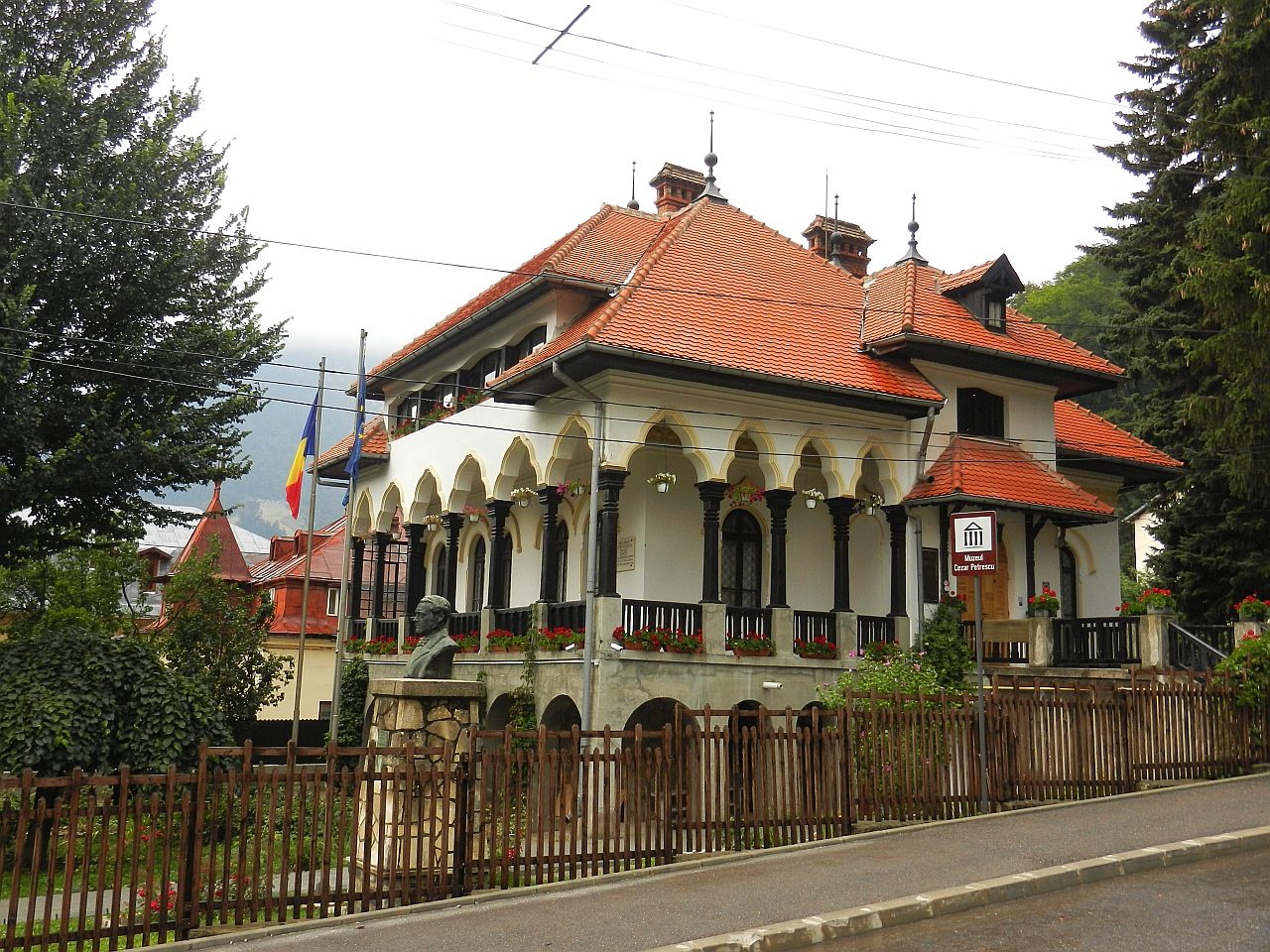 Casa-muzeu "Cezar Petrescu"